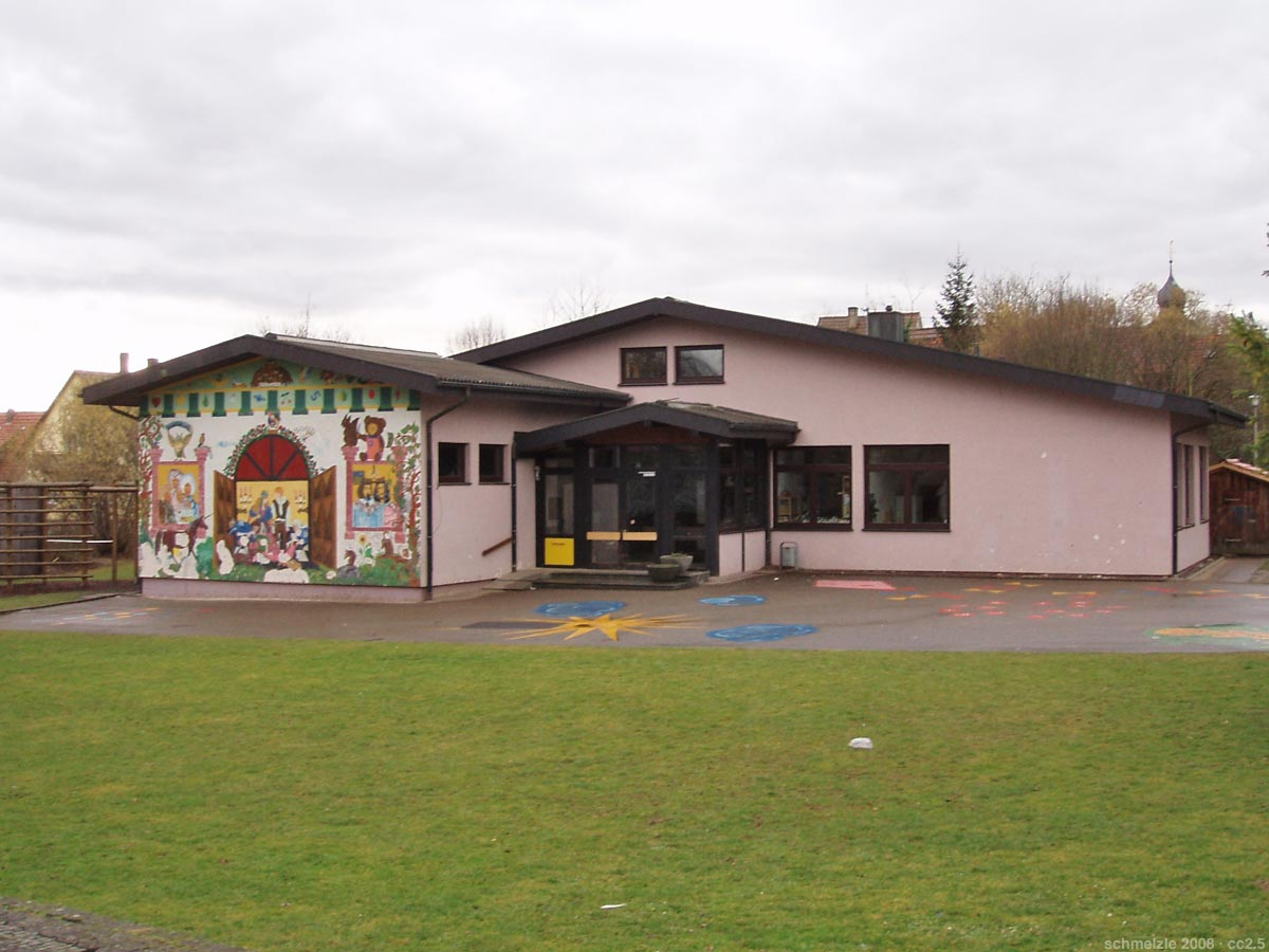 Schule in Bad Rappenau-Bonfeld